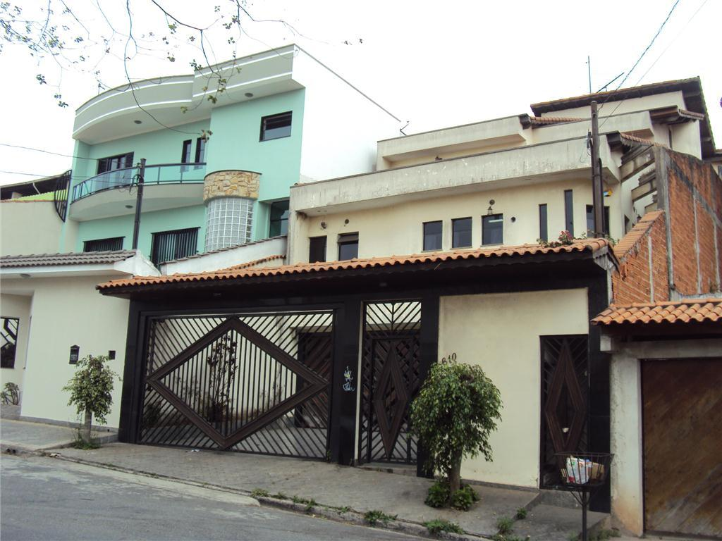 imoveis